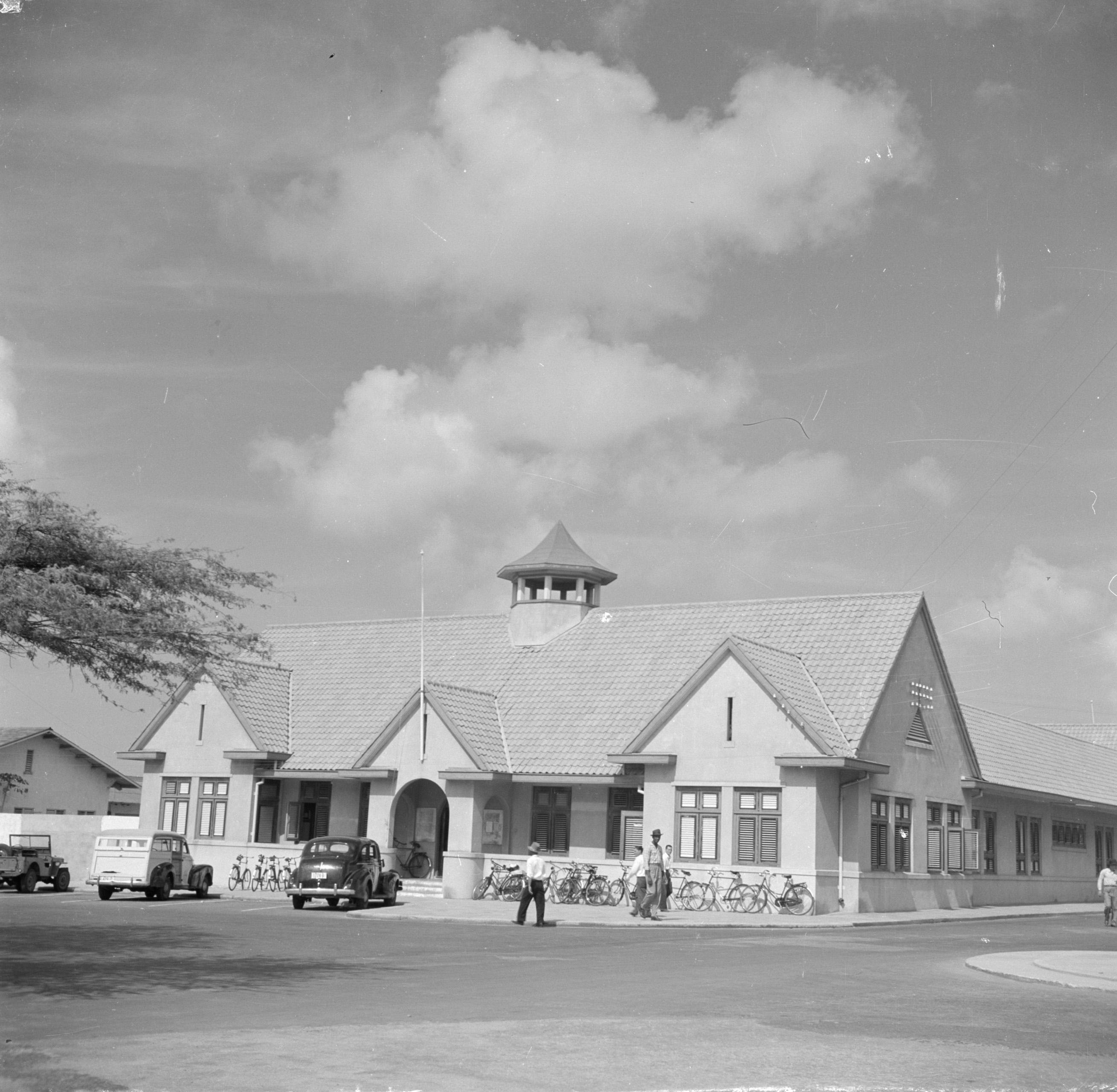 Collectie / Archief : Fotocollectie Van de Poll Reportage / Serie : Reis naar Suriname en de Nederlandse Antillen Beschrijving : Het postkantoor in Oranjestad op Aruba Datum : 1947 Locatie : Aruba, Oranjestad Trefwoorden : postkantoren Fotograaf : Poll, Willem van de, [onbekend] Auteursrechthebbende : Nationaal Archief Materiaalsoort : Negatief (zwart/wit) Nummer archiefinventaris : bekijk toegang 2.24.14.02 Bestanddeelnummer : 252-7883